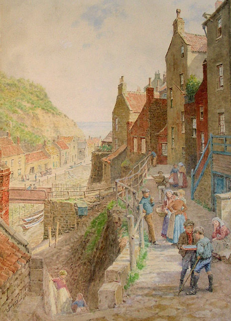 Staithes. Watercolour, 21.0" x 14.0"